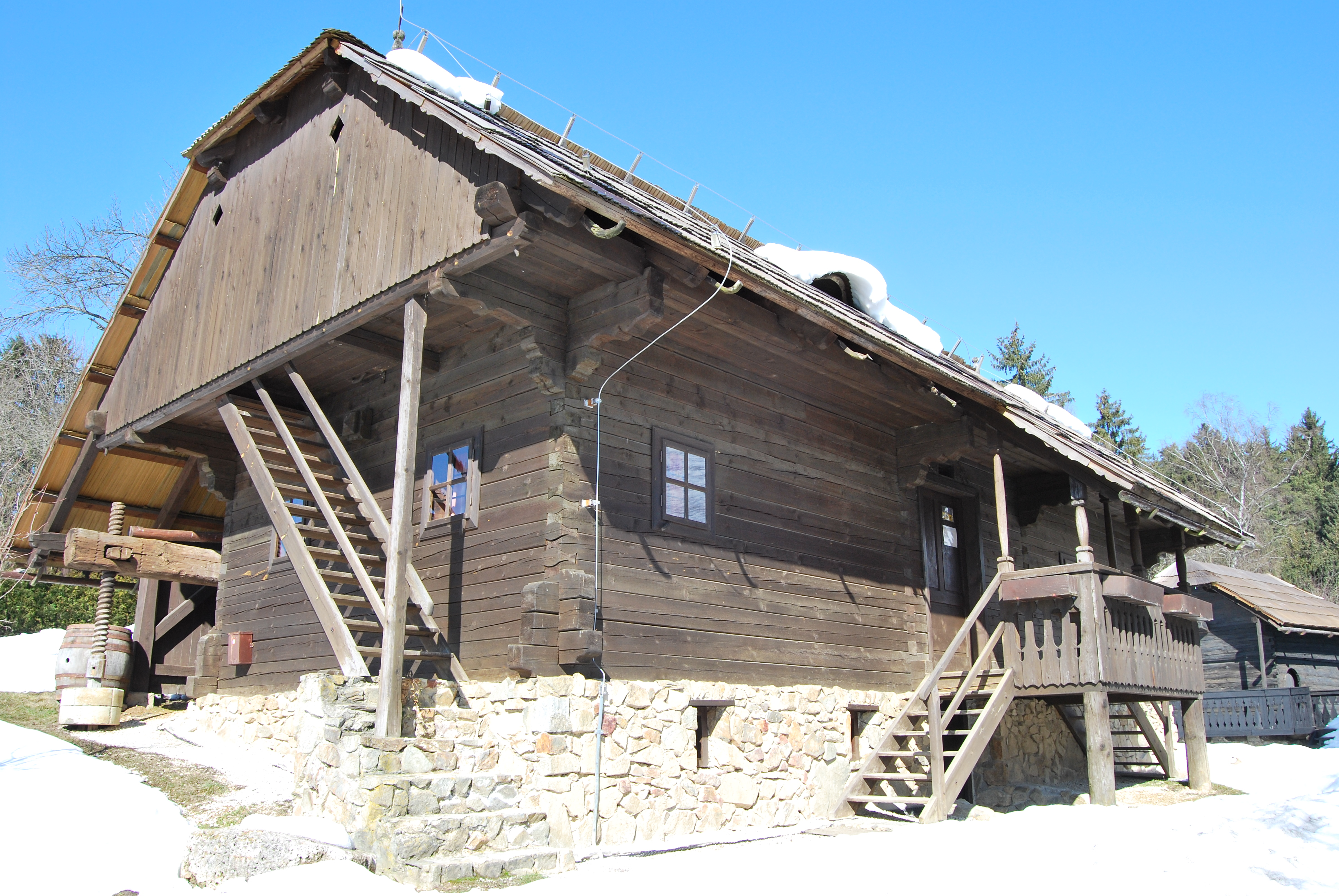 Prežihova bajta